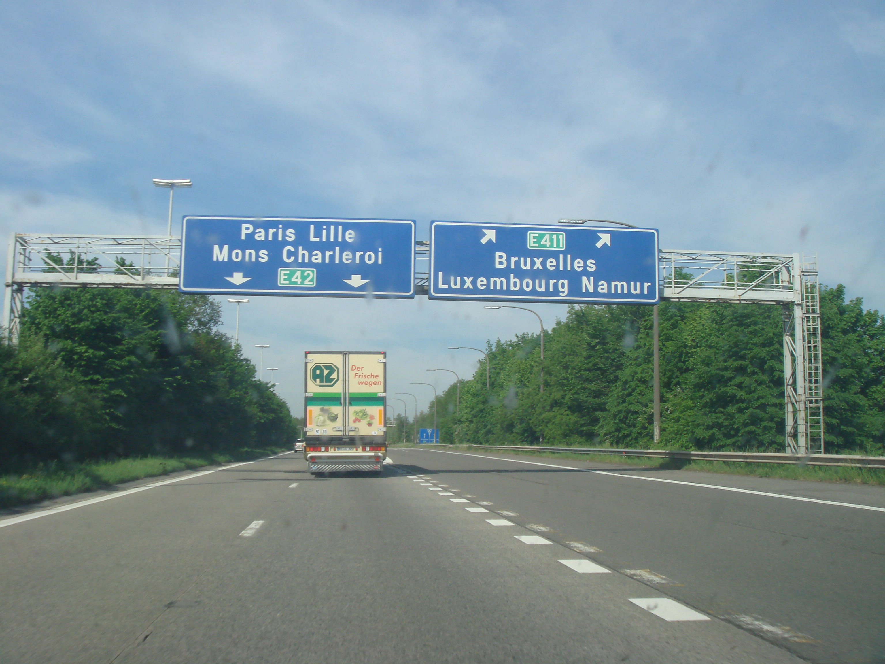 l'autoroute A15 belge au niveau de l'échangeur de Daussoulx